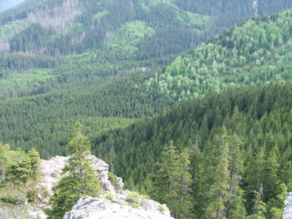 Dolina Waksmundzka. Widok z Gęsiej Szyi